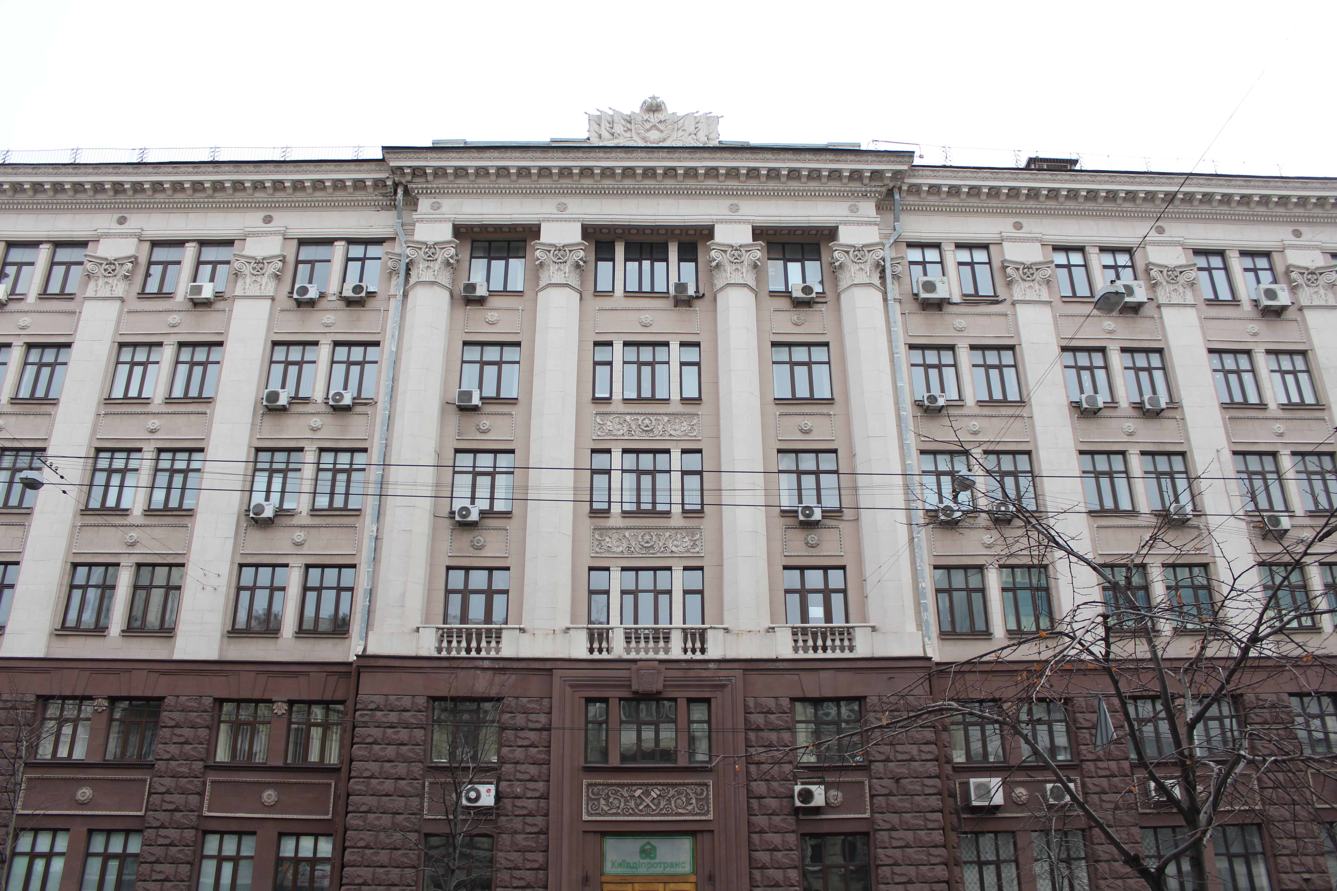 Будинок інституту Київдіпротранс, Київ, Петлюри Симона вул., 15